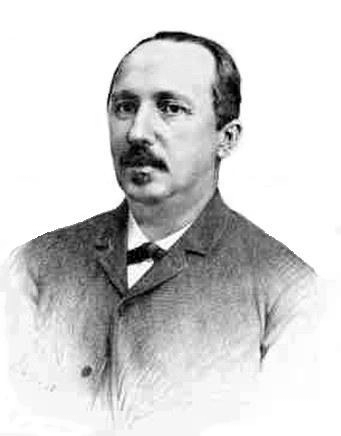 Constantin Esarcu (n. 5 noiembrie 1836, București; d. 8 iunie 1898, Govora, județul Vâlcea)